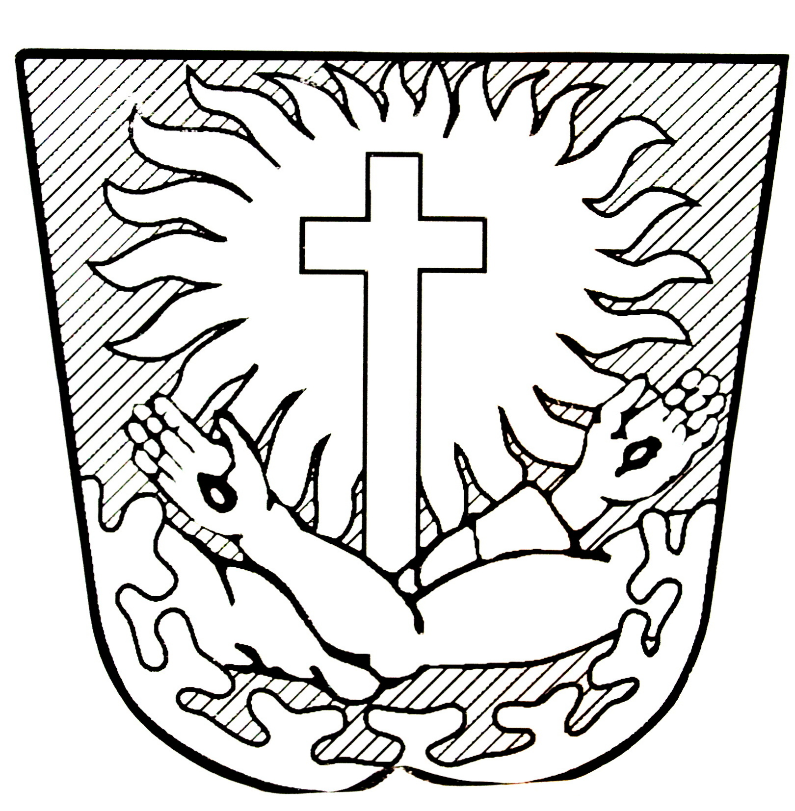 Minoritský klášter v Brně